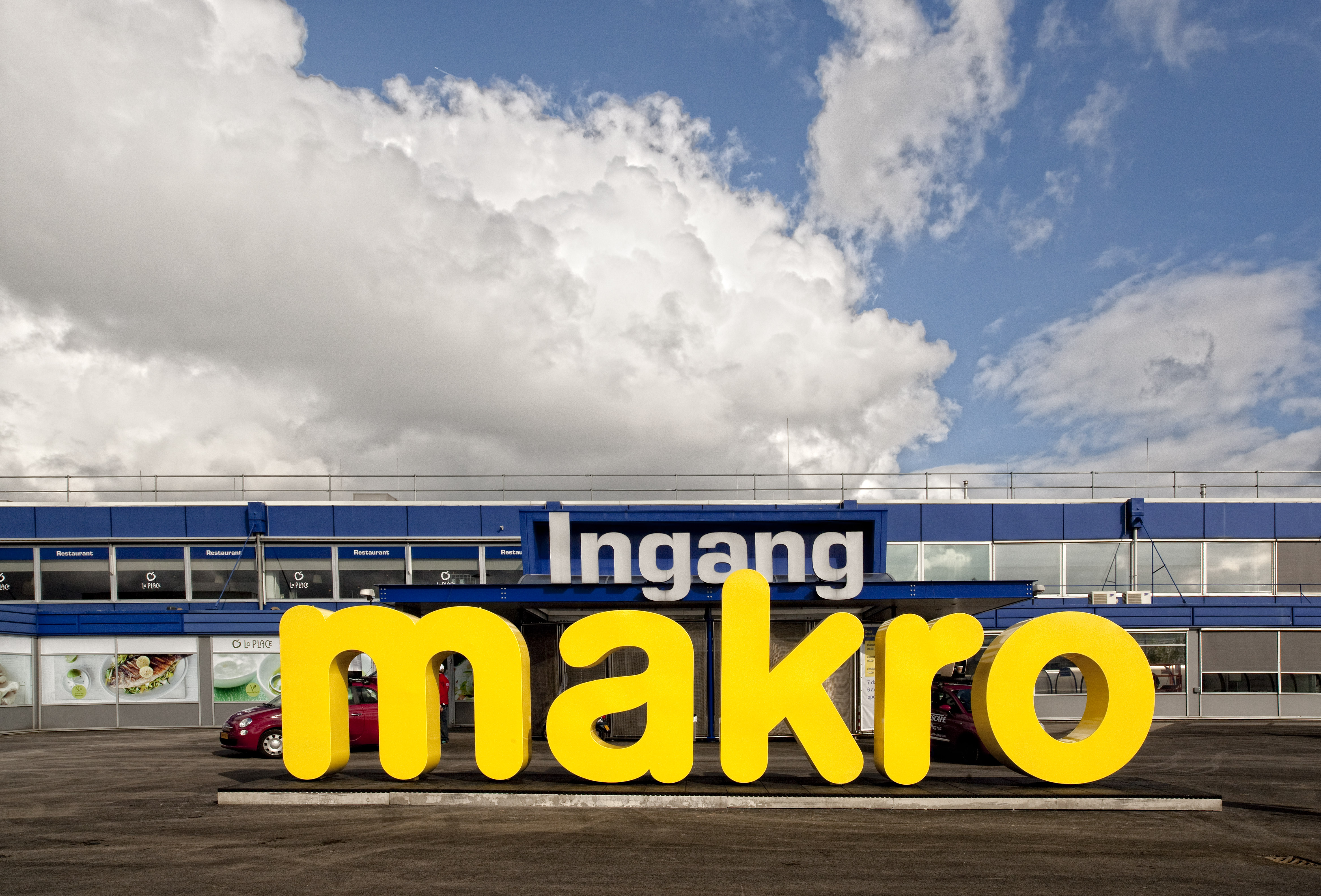 Makro Vernieuwt! Entree van Makro Amstedam